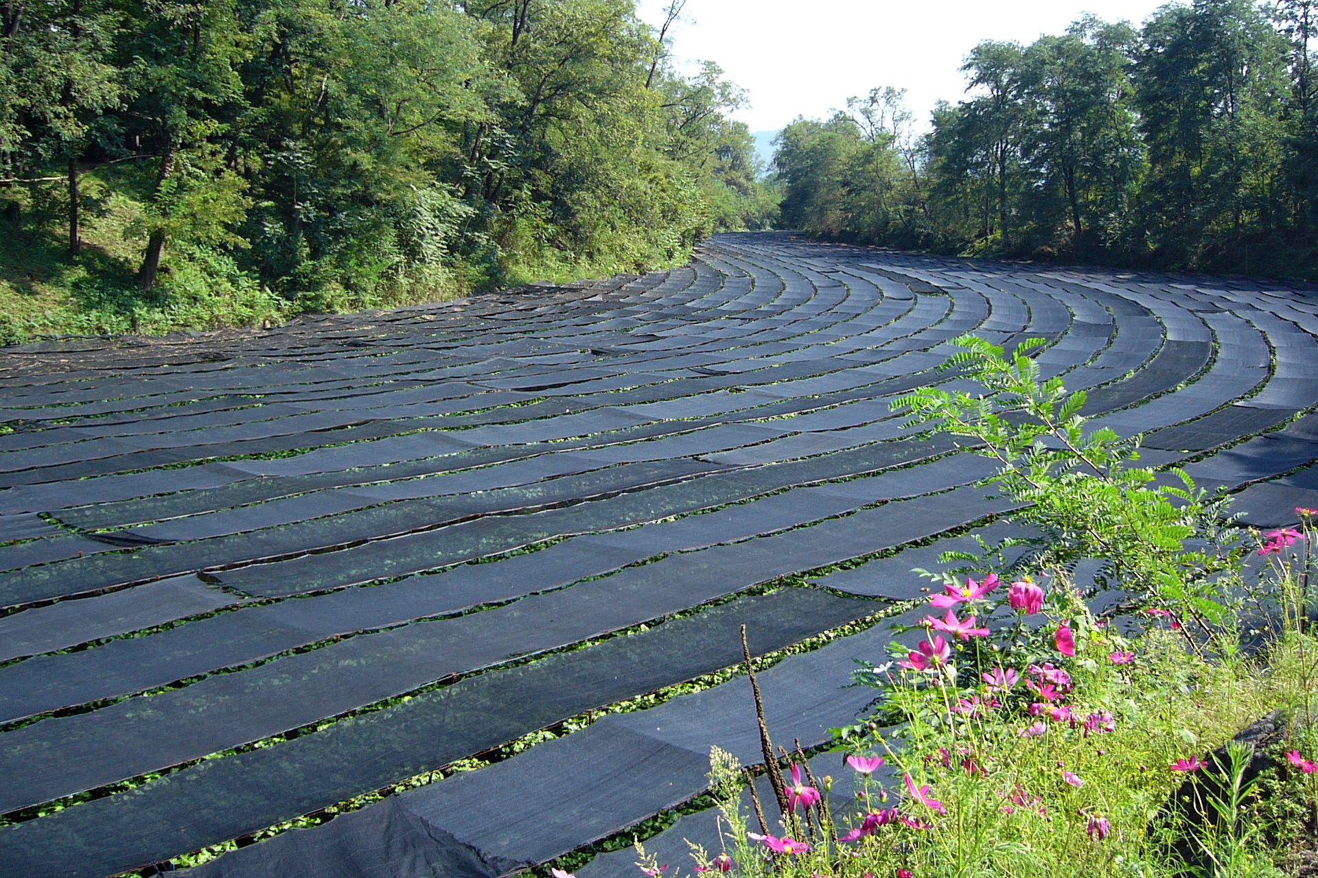 Daio Wasabi Farm in Azumino, Nagano, Japan